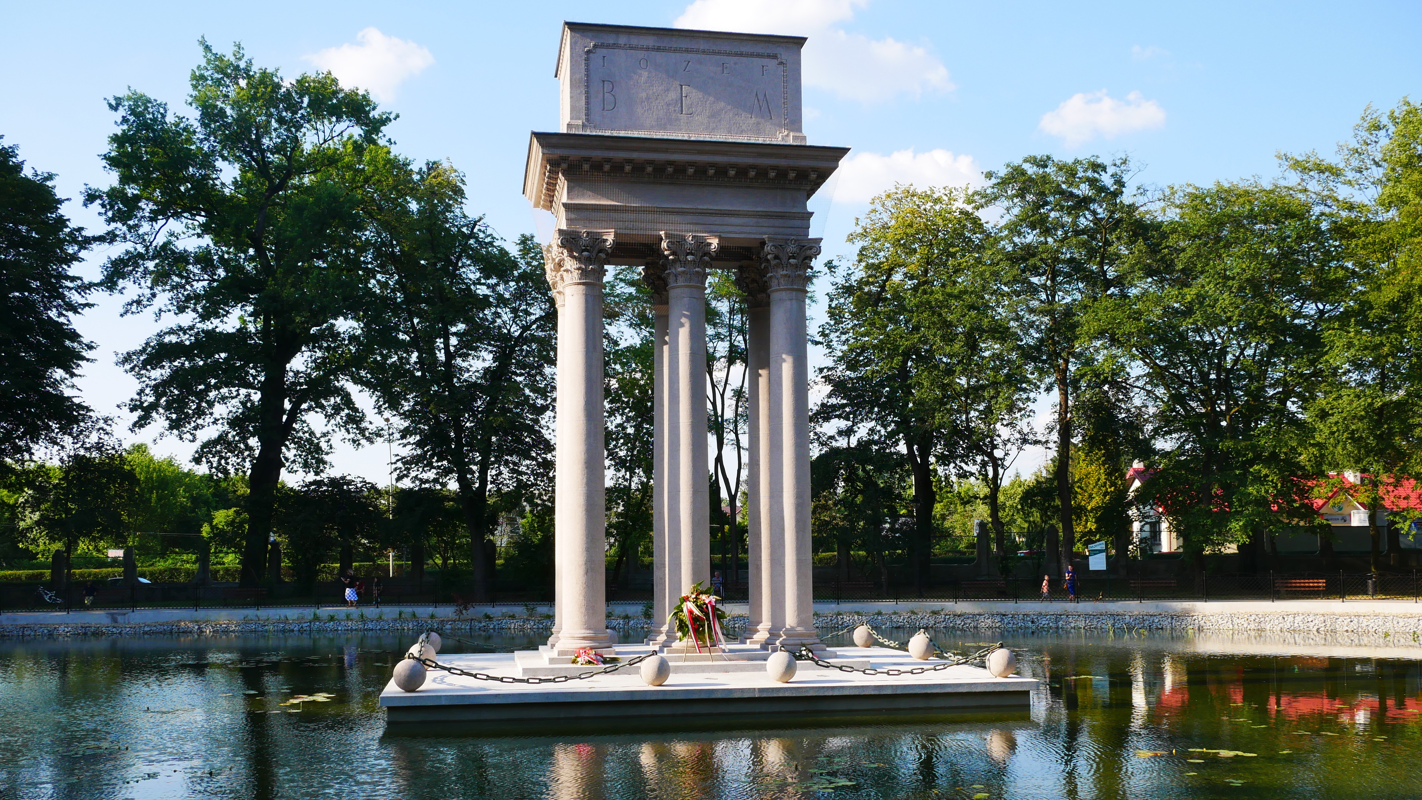 General-Józef-Bem-Mausoleum im Park Srzelecki, Tarnów